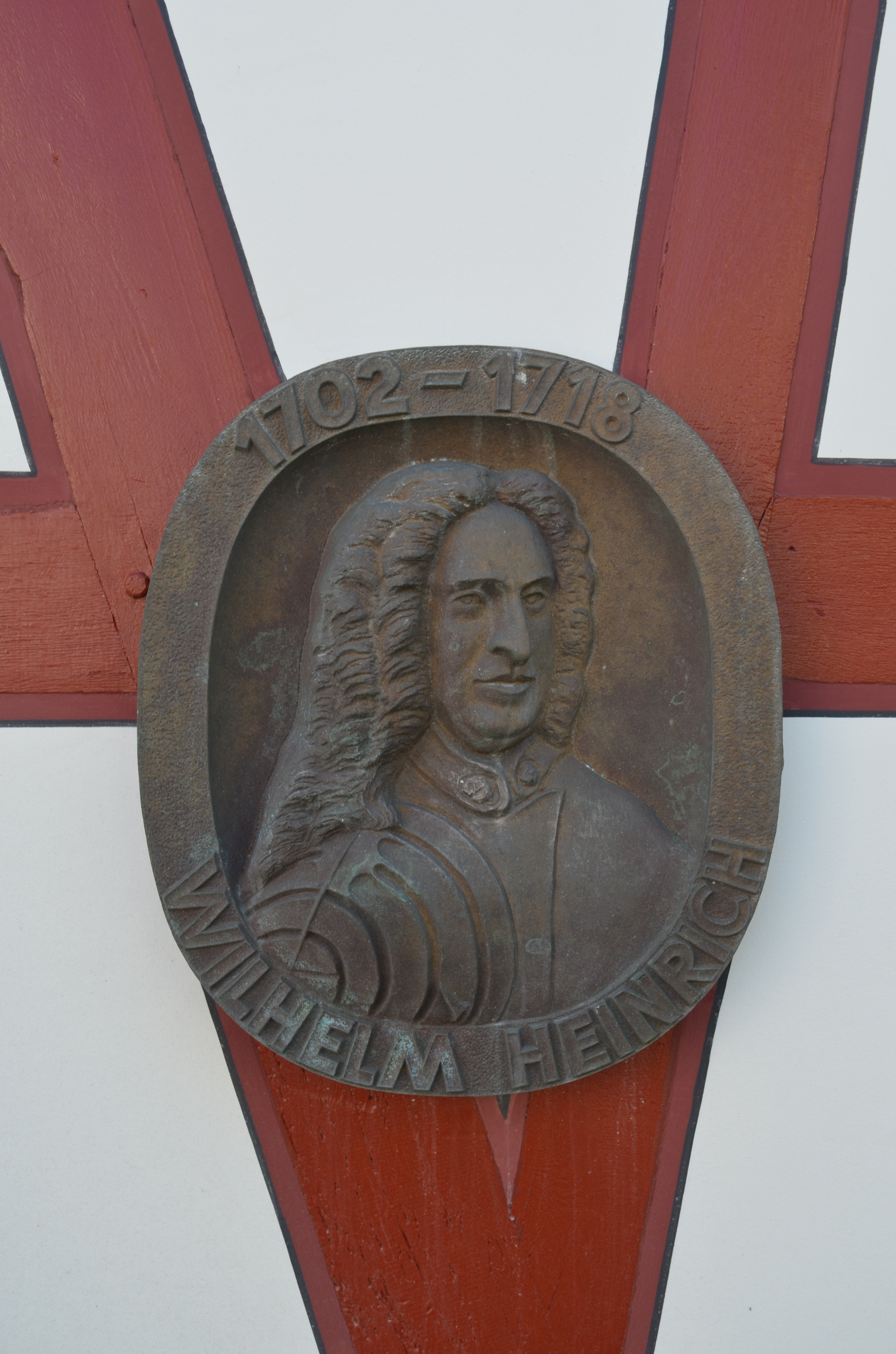 Wilhelmsdorf, Plakette Fürst Wilhelm Heinrich von Nassau-Usingen (* 2. Mai 1684 in ’s-Hertogenbosch; † 14. Februar 1718 in Usingen). Die BronzePlakette wurde 2011 von Kurt Heinrich gestaltet und befindet sich am alten Rathaus in Wilhelmsdorf.